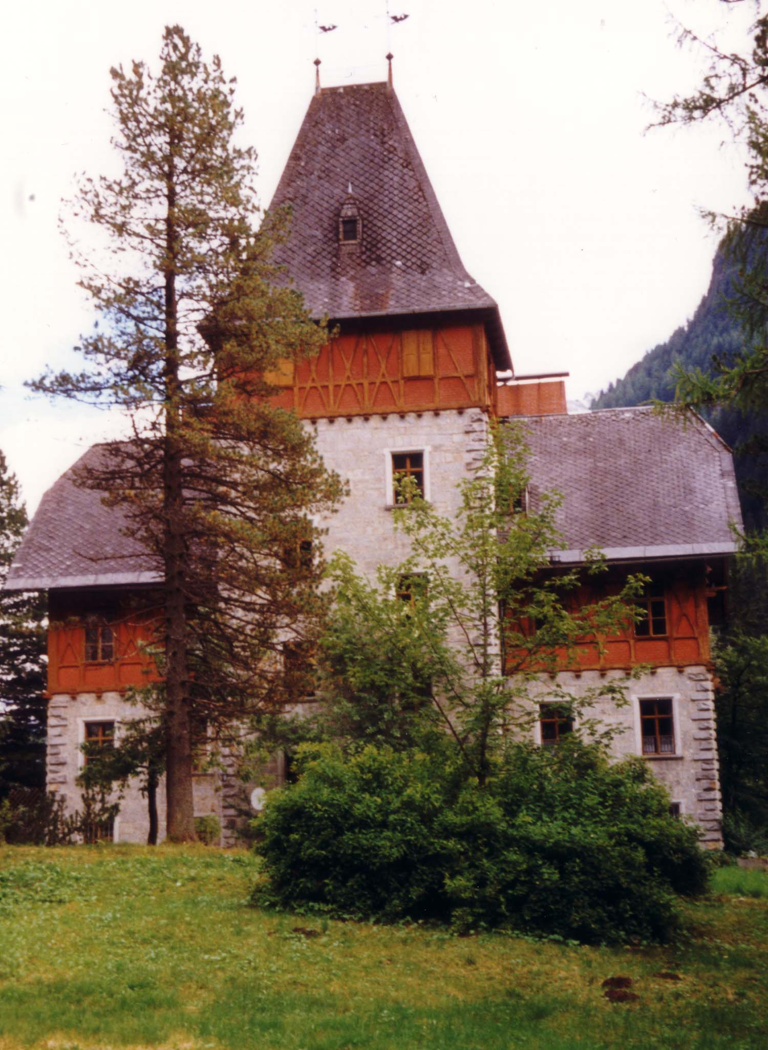 Jagdschloss Czernin in Böckstein bei Bad Gastein; Aufnahme September 1997